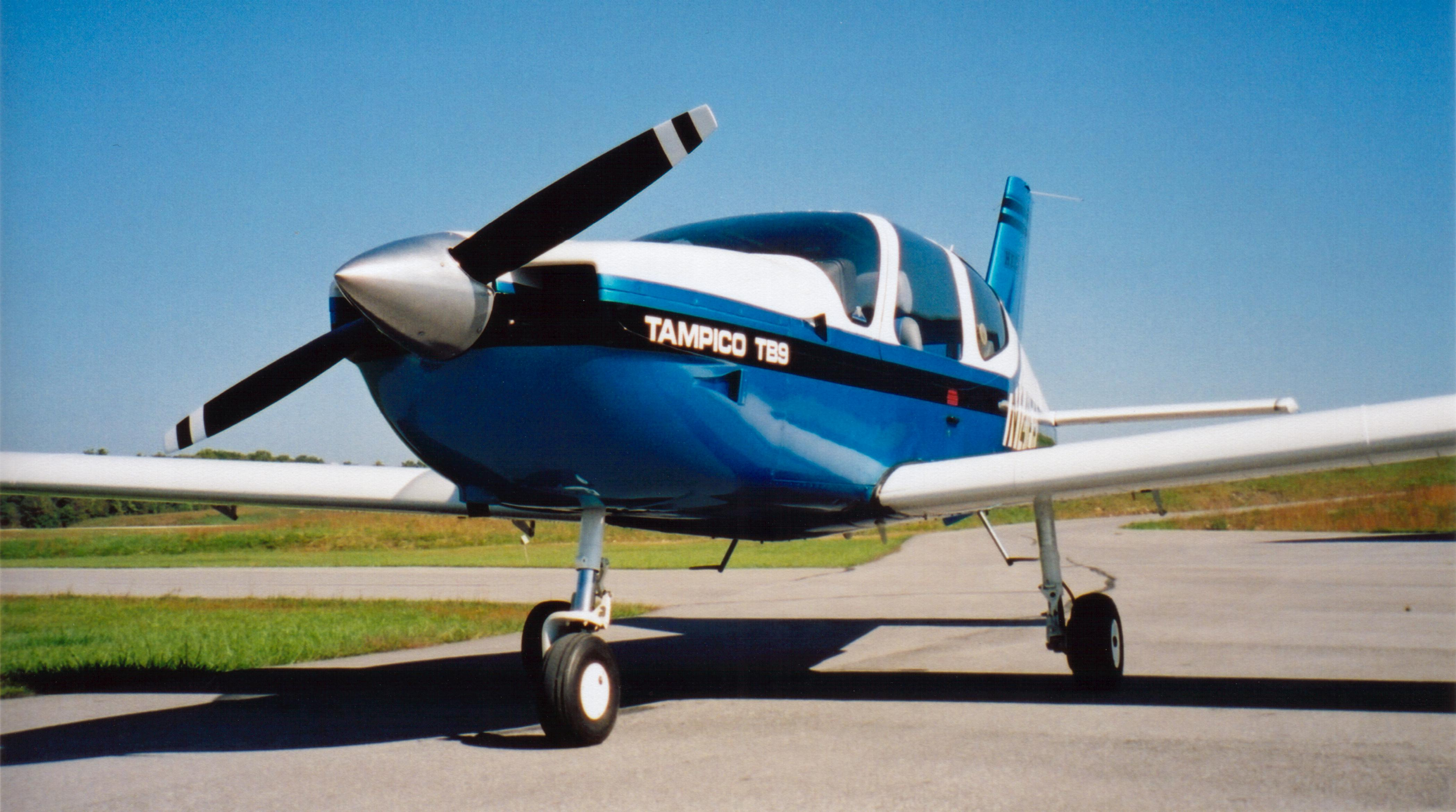 Socata TB-9